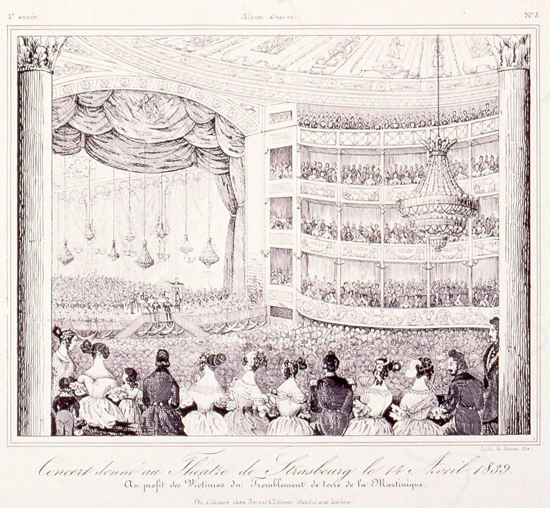 Concert donné au théâtre de Strasbourg le 14 avril 1839, au profit des victimes du tremblement de terre de la Martinique